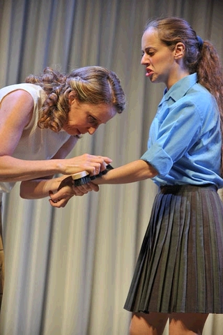 יעל איתן ושירי גולן בהצגה למה לא באת לפני המלחמה בתיאטרון באר שבע